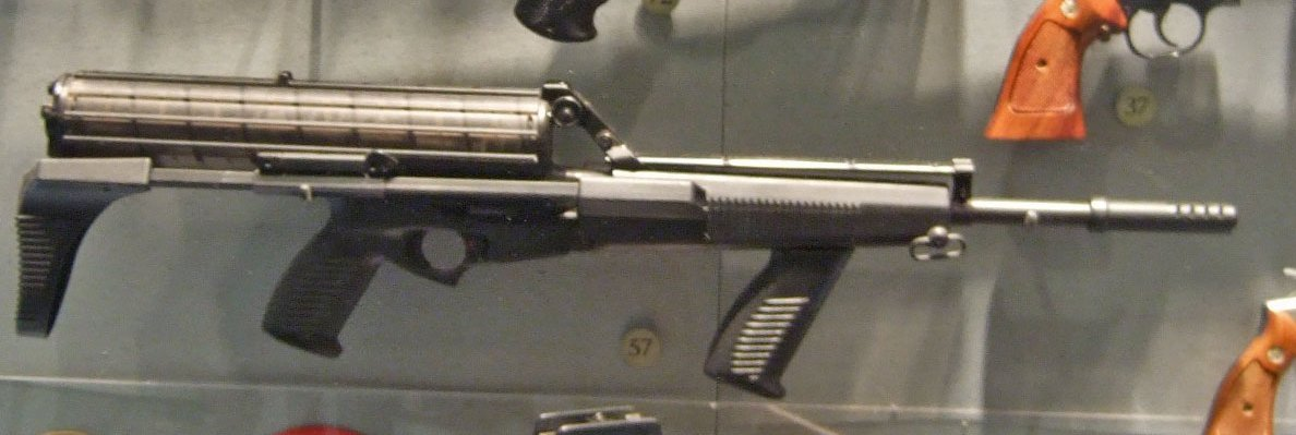 Calico M960 submachine gun